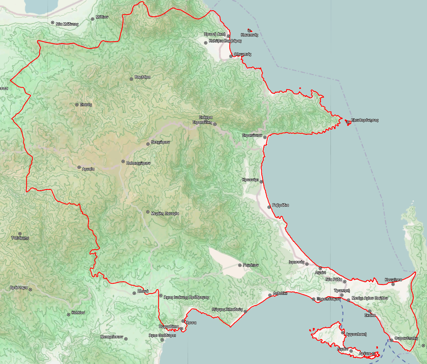 Τοπογραφικός χάρτης του Δήμου Αριστοτέλη